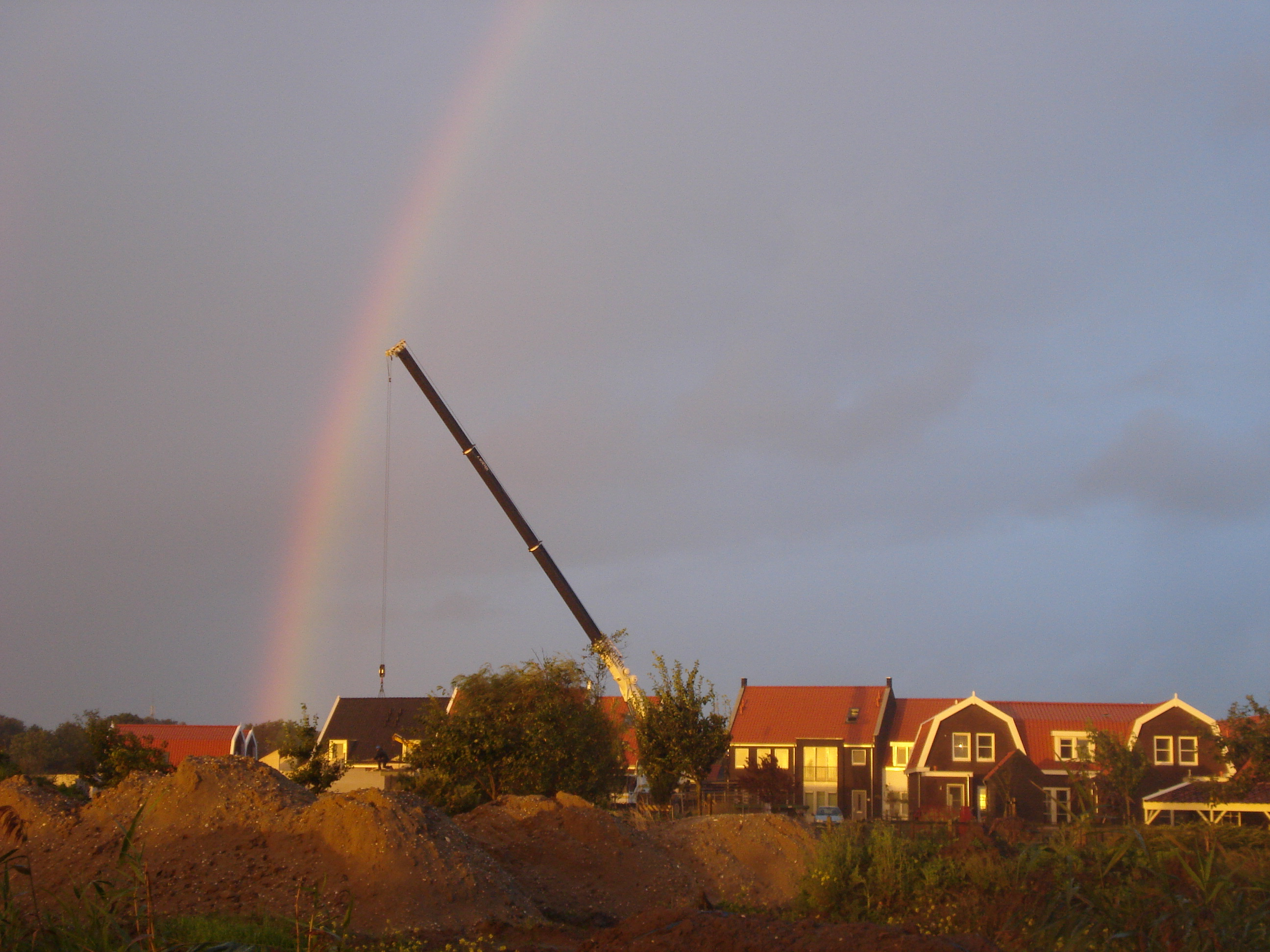 Welgelegen_Ouddorp_september2012